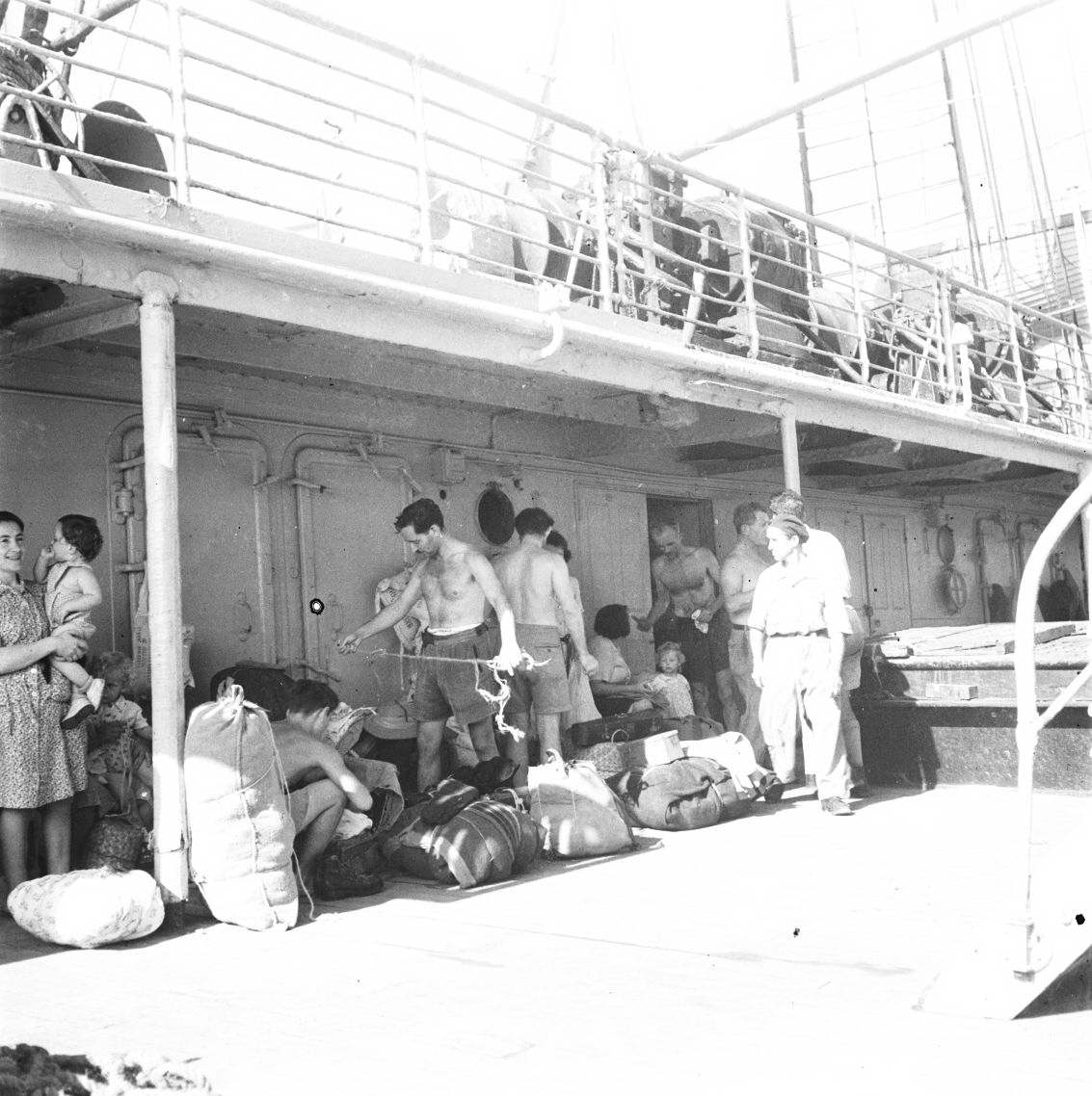 אוסף צילומים של הצלם זולטן קלוגר טווח מספרי התשלילים 25435 - 25486: פליטי מאוריציוס על אוניית בית החולים "פרנקוניה"